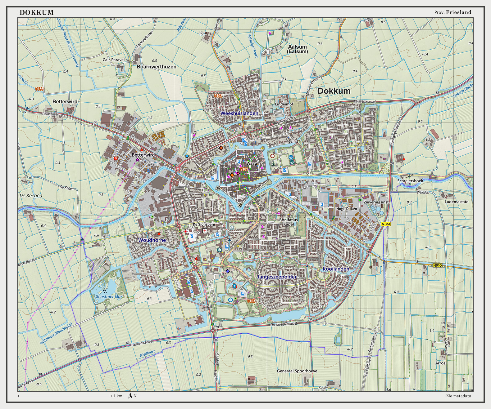 Topografische kaart van Dokkum (woonplaats). Resolutie: 300 pixels/km. Kaartbeeld samengesteld uit de open geodata van de Top10NL en Top25namen (Basisregistratie Topografie, Kadaster), Creative Commons BY licentie. Gebouwvlakken uit open geodata BAG extract. Wegen uit de OpenStreetMap. Reliëfschaduw uit de Actuele Hoogtekaart AHN2. Samenstelling en kleurenschema: Jan-Willem van Aalst, met QGIS2. Zie ook de Legenda.